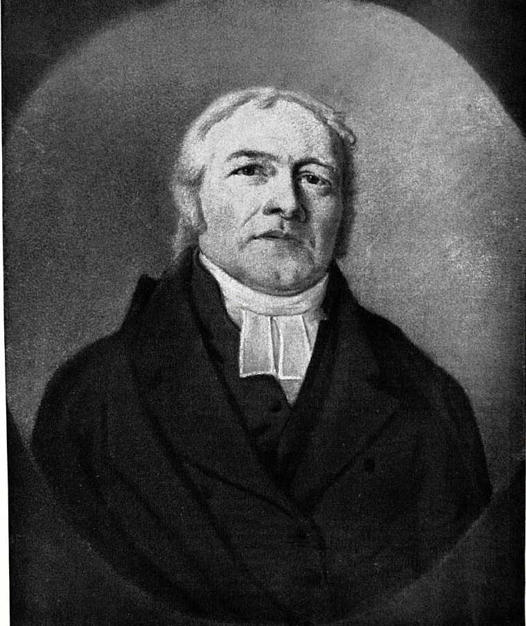 Adolph Georg Kottmeier